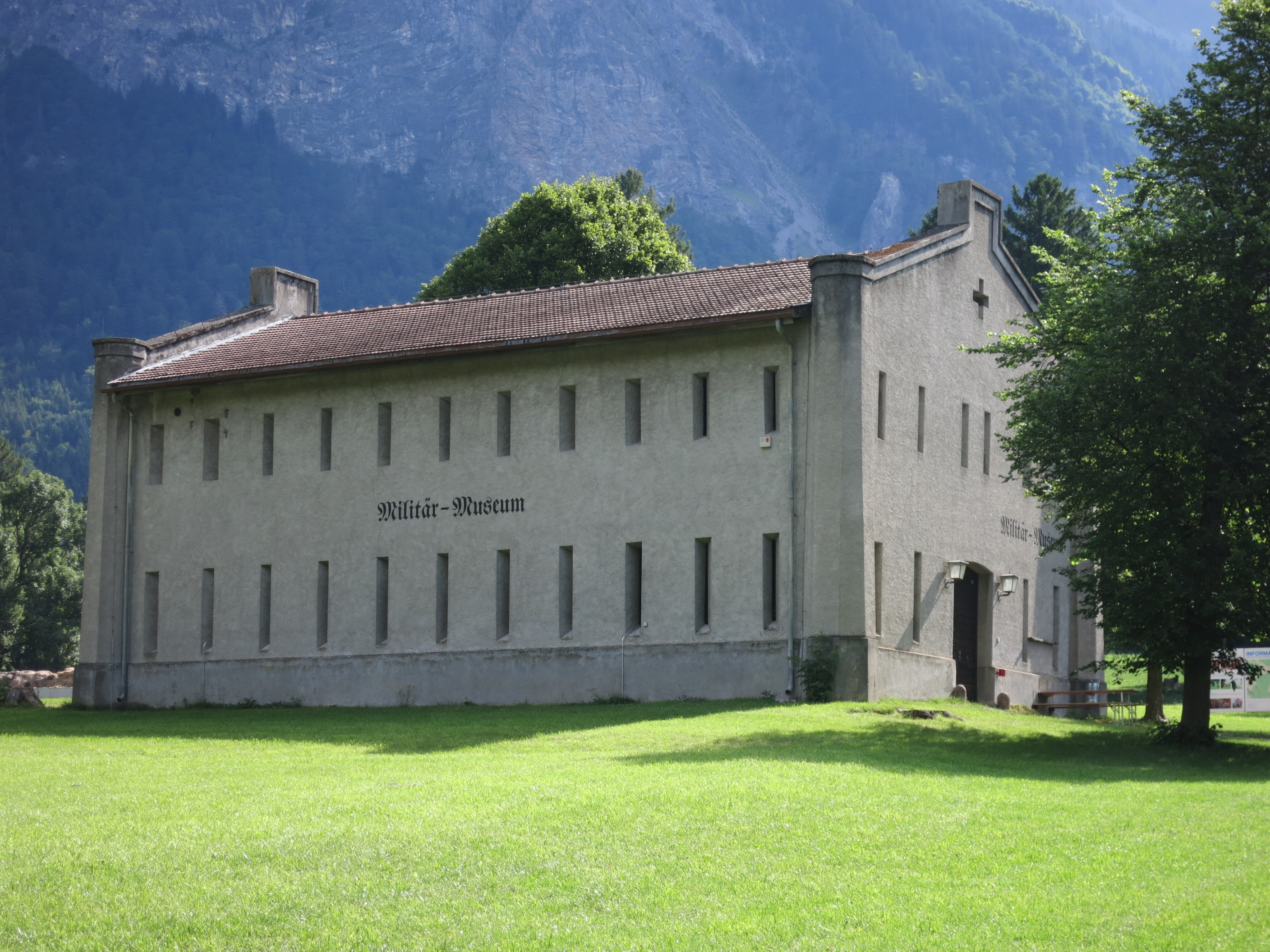 Festung St. Luzisteig GR, Schweiz